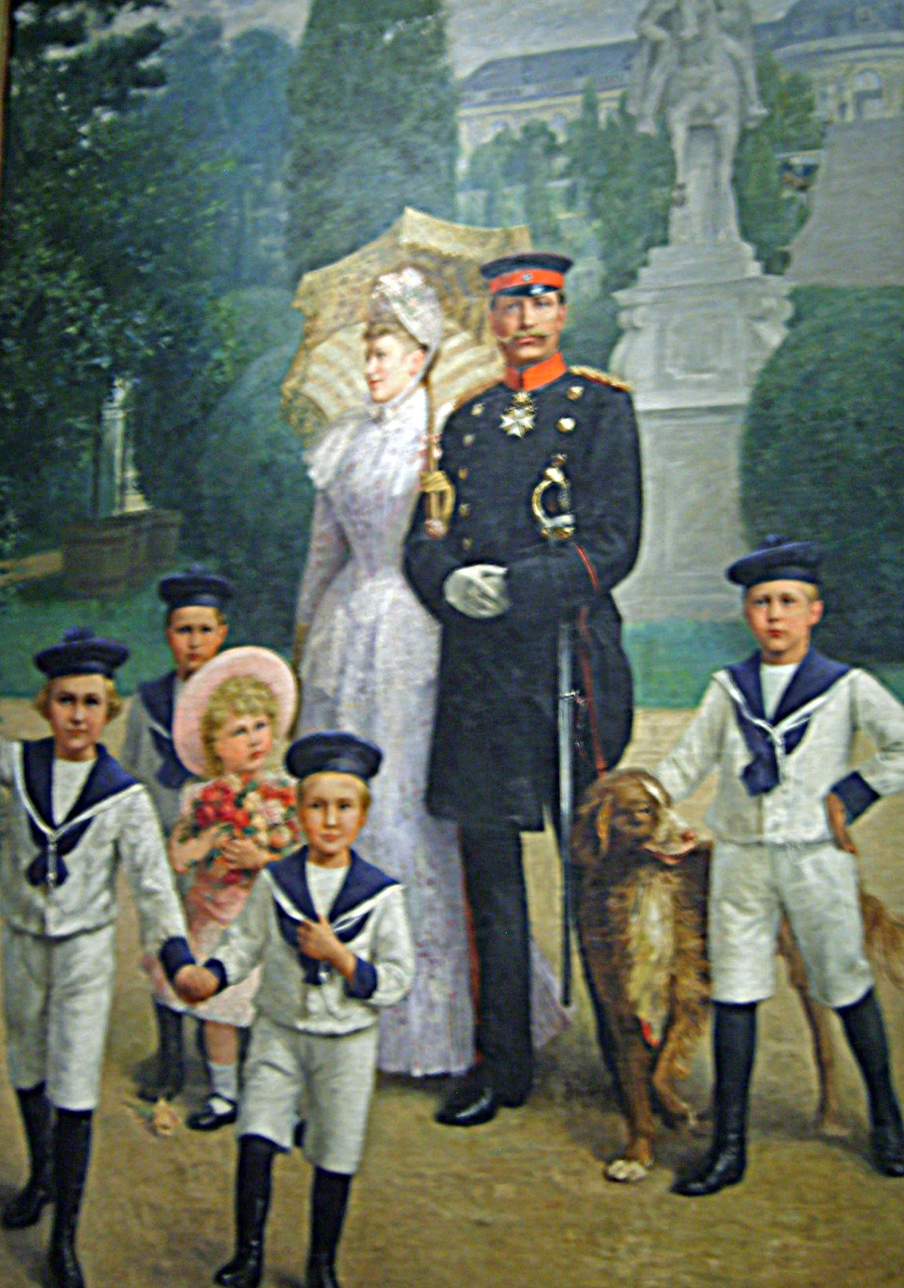 Die kaiserliche Familie im Park zu Sanssouci: Wilhelm II., Deutscher Kaiser (1888-1918), die Kaiserin Auguste Viktoria und die fünf ältesten Prinzen. Kronprinz Friedrich Wilhelm Victor August Ernst (1882–1951), ∞ 1905 Herzogin Cecilie zu Mecklenburg-Schwerin Prinz Wilhelm Eitel Friedrich Christian Karl (1883–1942), ∞ 1906-1926 Herzogin Sophie Charlotte von Oldenburg Prinz Adalbert Ferdinand Berengar (1884–1948), ∞ 1914 Prinzessin Adelheid von Sachsen-Meiningen Prinz August Wilhelm (1887–1949), ∞ 1908-1920 Prinzessin Alexandra von Schleswig-Holstein-Sonderburg-Glücksburg (1887–1957) Prinz Oskar Karl Gustav Adolf (1888–1958), ∞ 1914 Gräfin Ina Maria von Bassewitz (1888–1973) Prinz Joachim Franz Humbert (1890–1920), ∞ 1916 Prinzessin Marie Auguste von Anhalt Prinzessin Viktoria Luise Adelheid Mathilde Charlotte (1892–1980), ∞ 1913 Herzog Ernst August von Braunschweig-Lüneburg